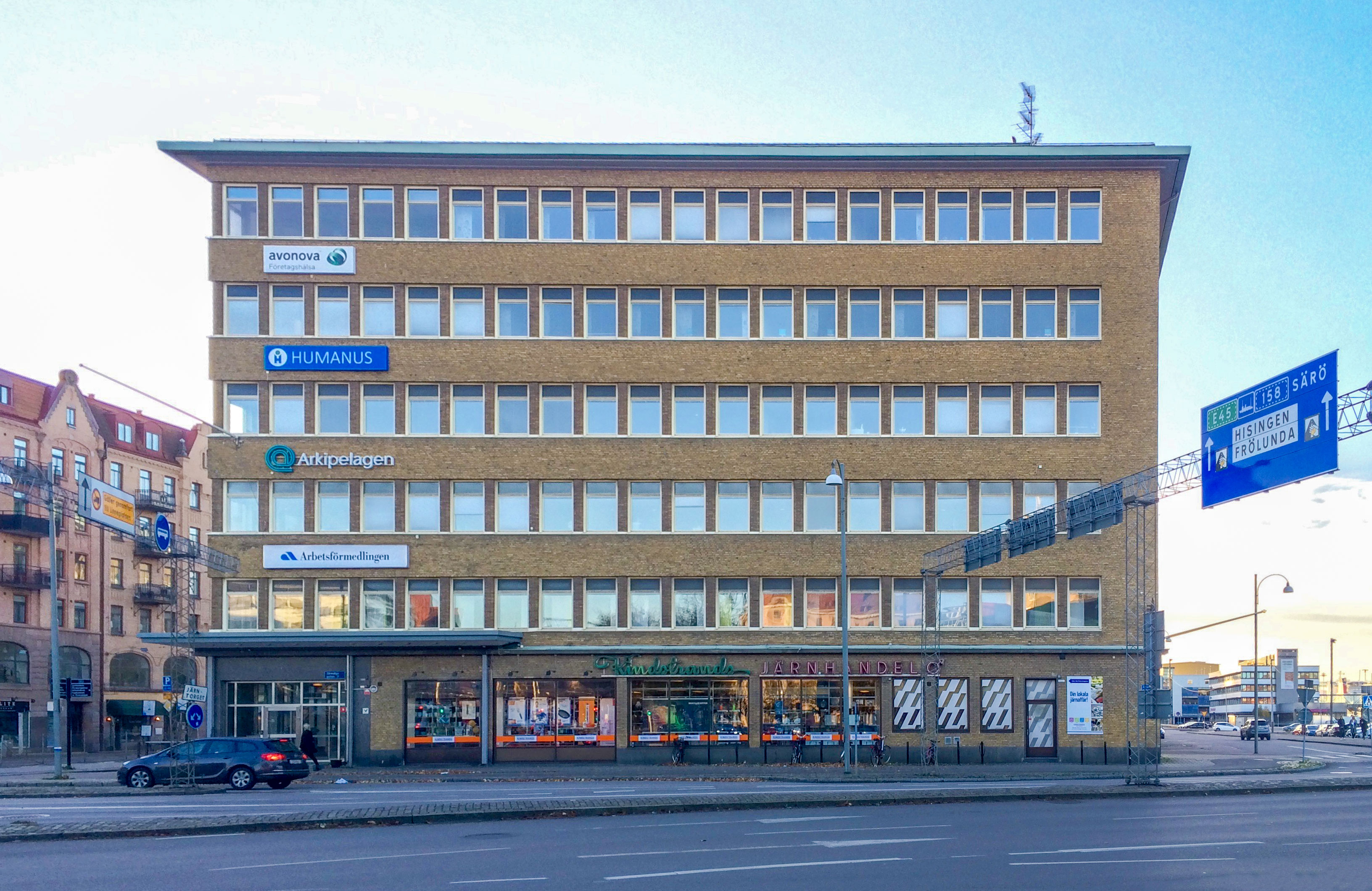 Kindstrands järnhandel, Arbetsförmedlingen m.m. vid Järnvågsgatan 3 i Masthugget, Göteborg.